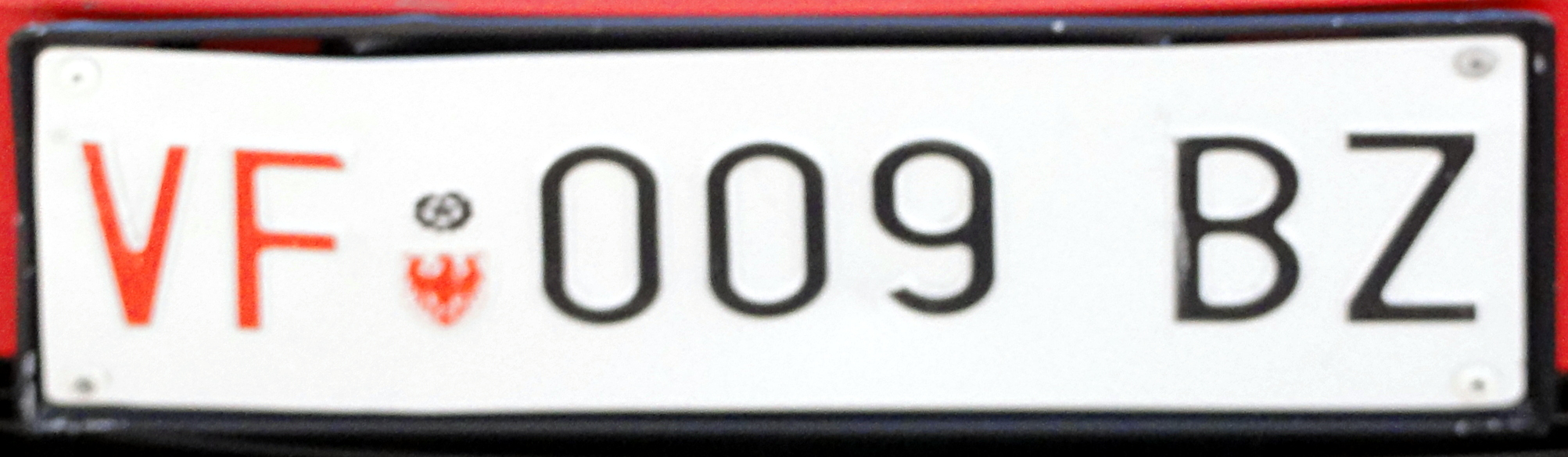 KFZ-Kennzeichen der italienischen öffentlichen Feuerwehren beginnend mit "VF"